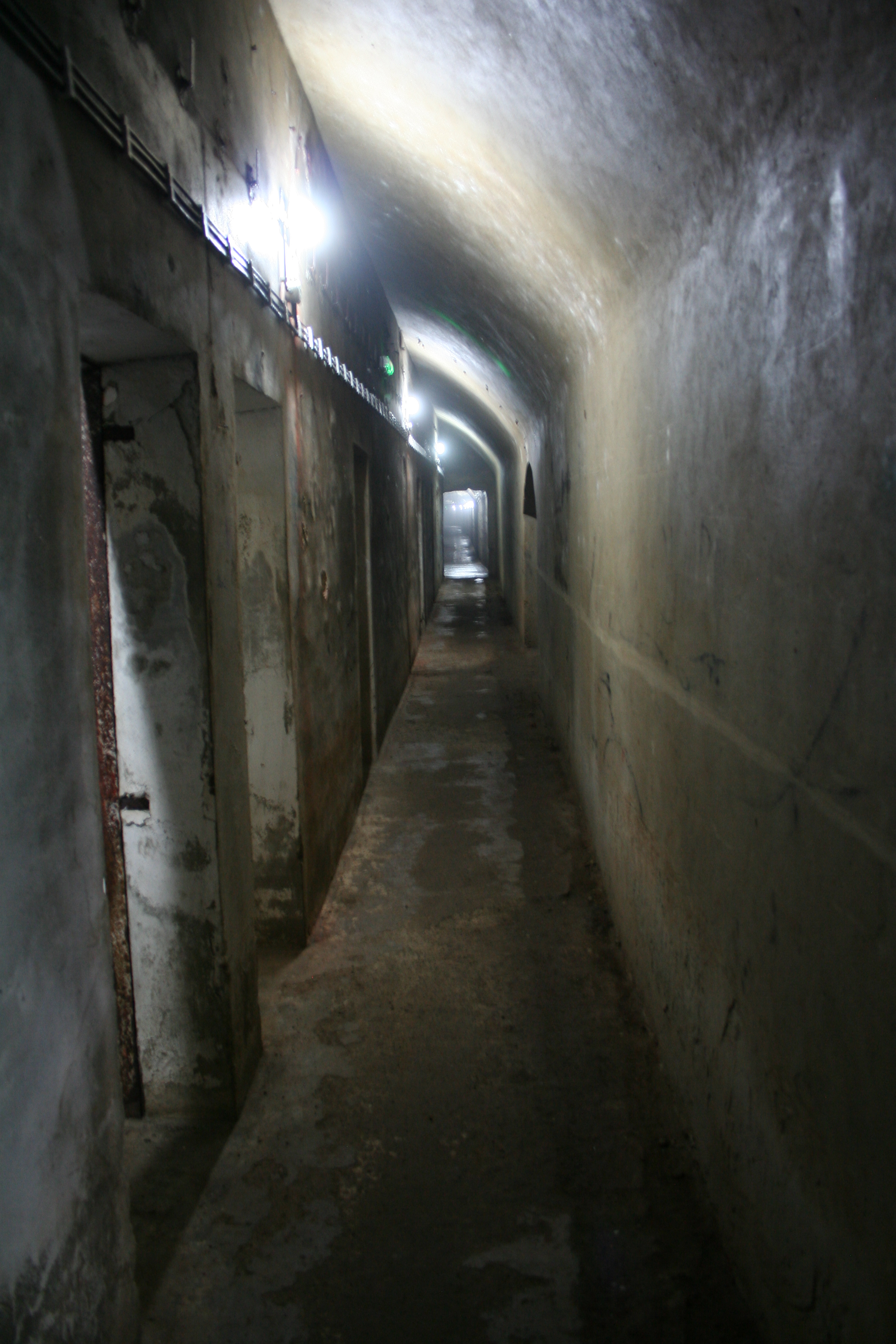 Podzemni grad, Mali Zvornik